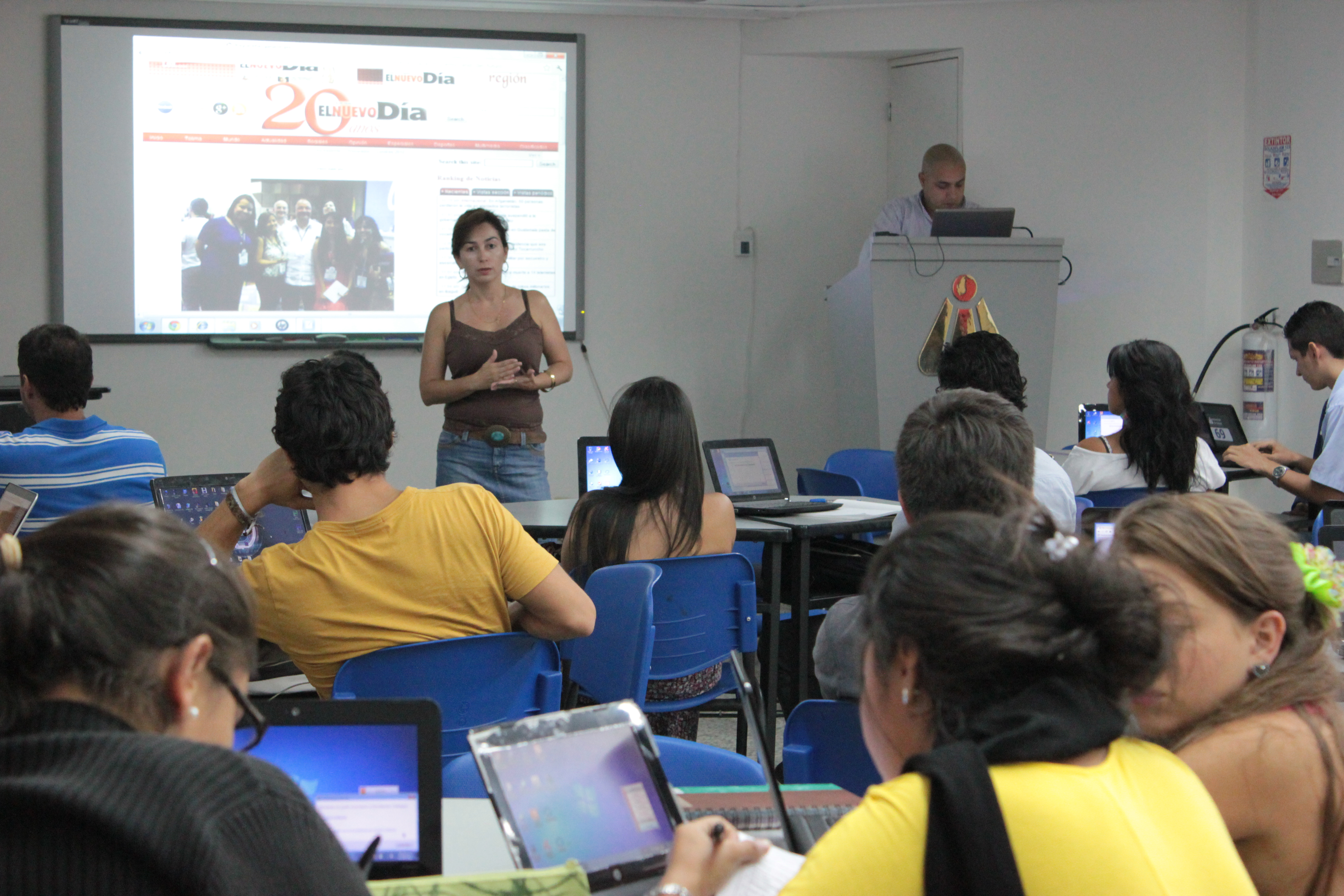 Salon 811